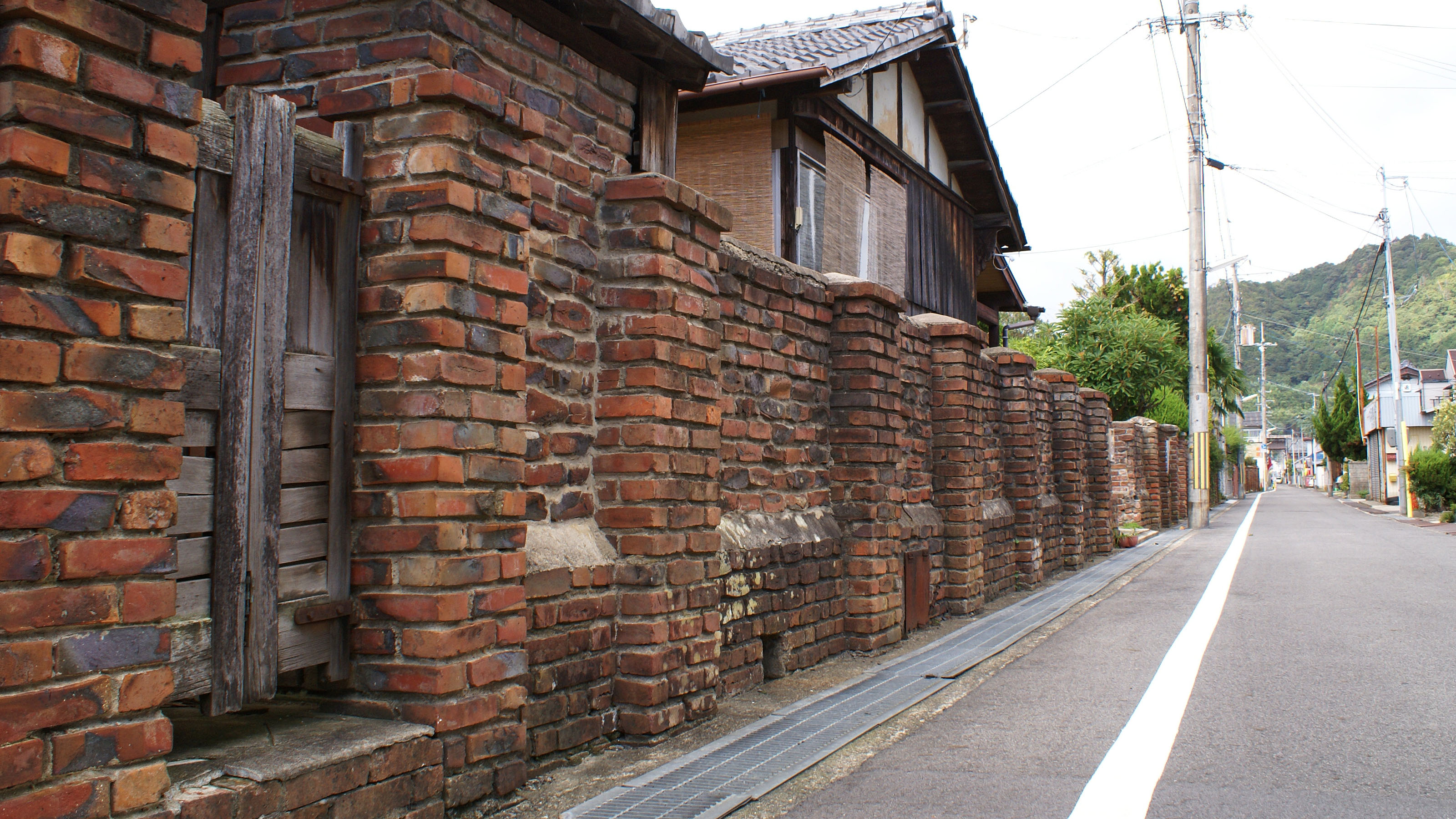 Ikeda-cho in Omihachiman, Shiga, Japan